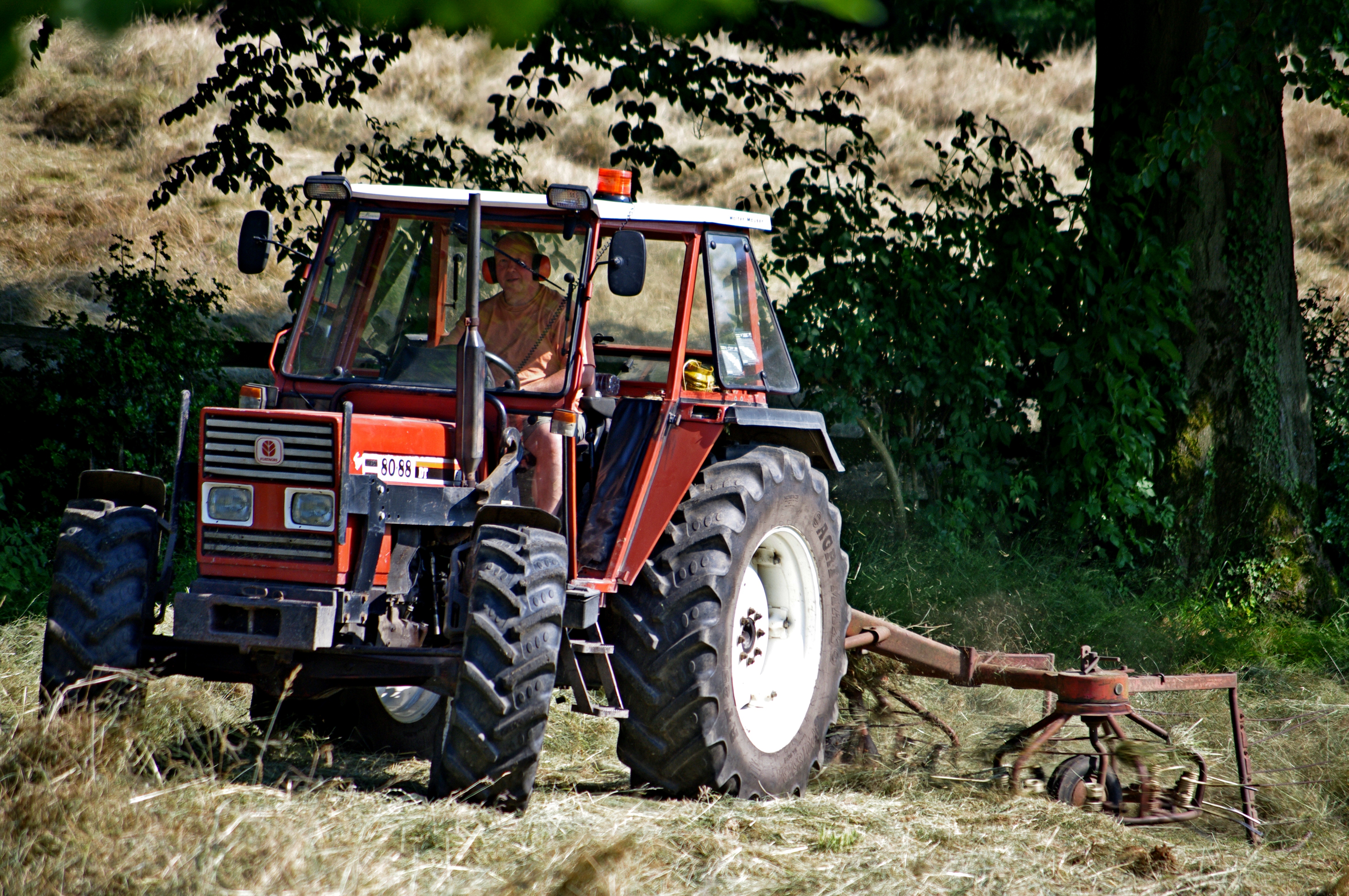 fiatagri 80-88Dt